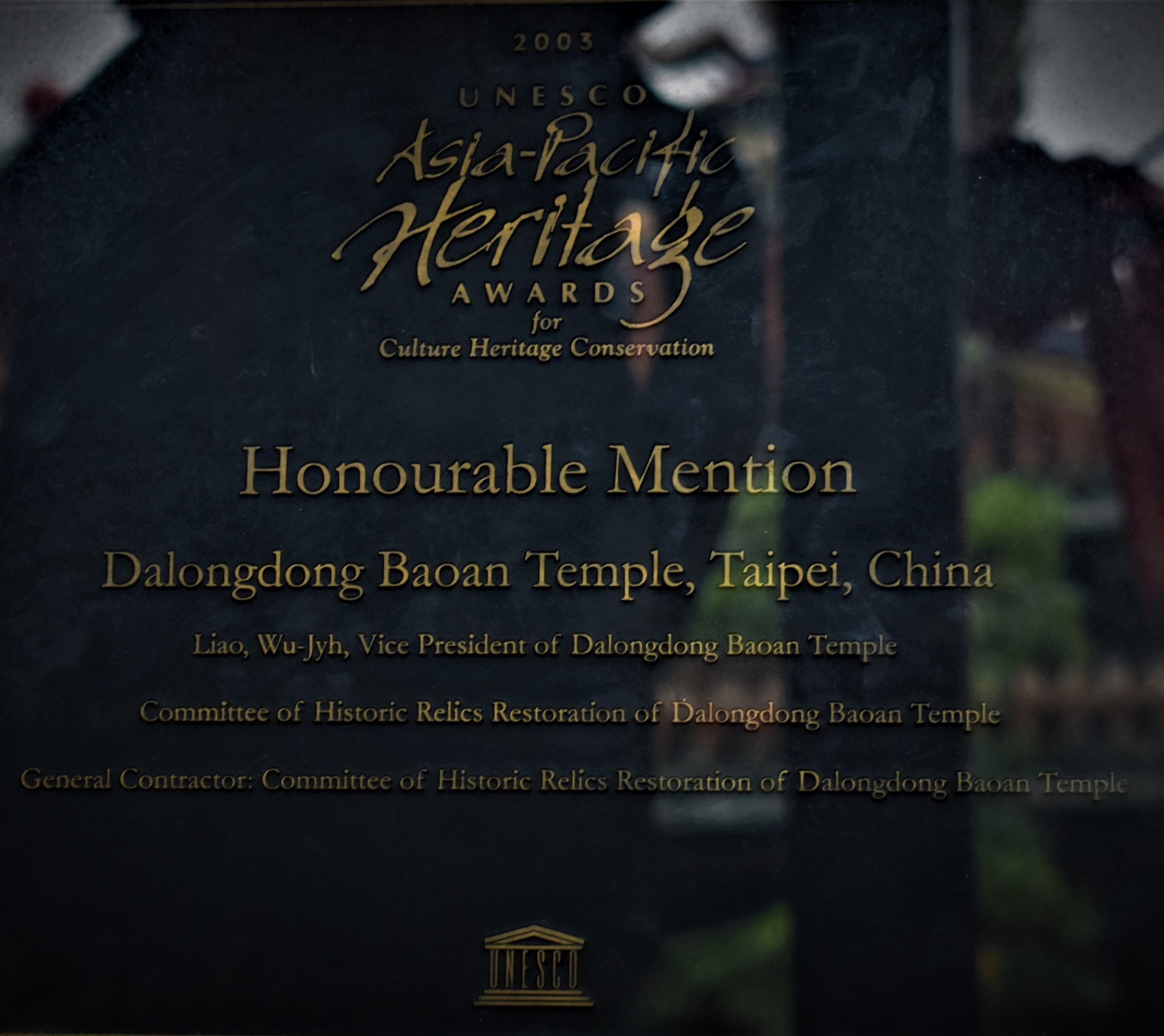 中文（台灣）: 2003年大龍峒保安宮獲聯合國教科文組織亞太文化資產保存獎獎牌。